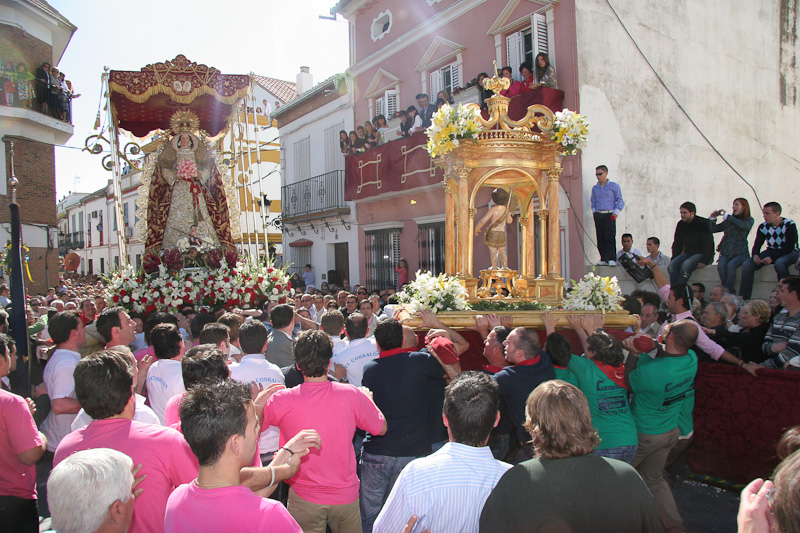 Las Carreritas This is a photography of a Folklore festival in Spain (Wikidata id Q5400462).